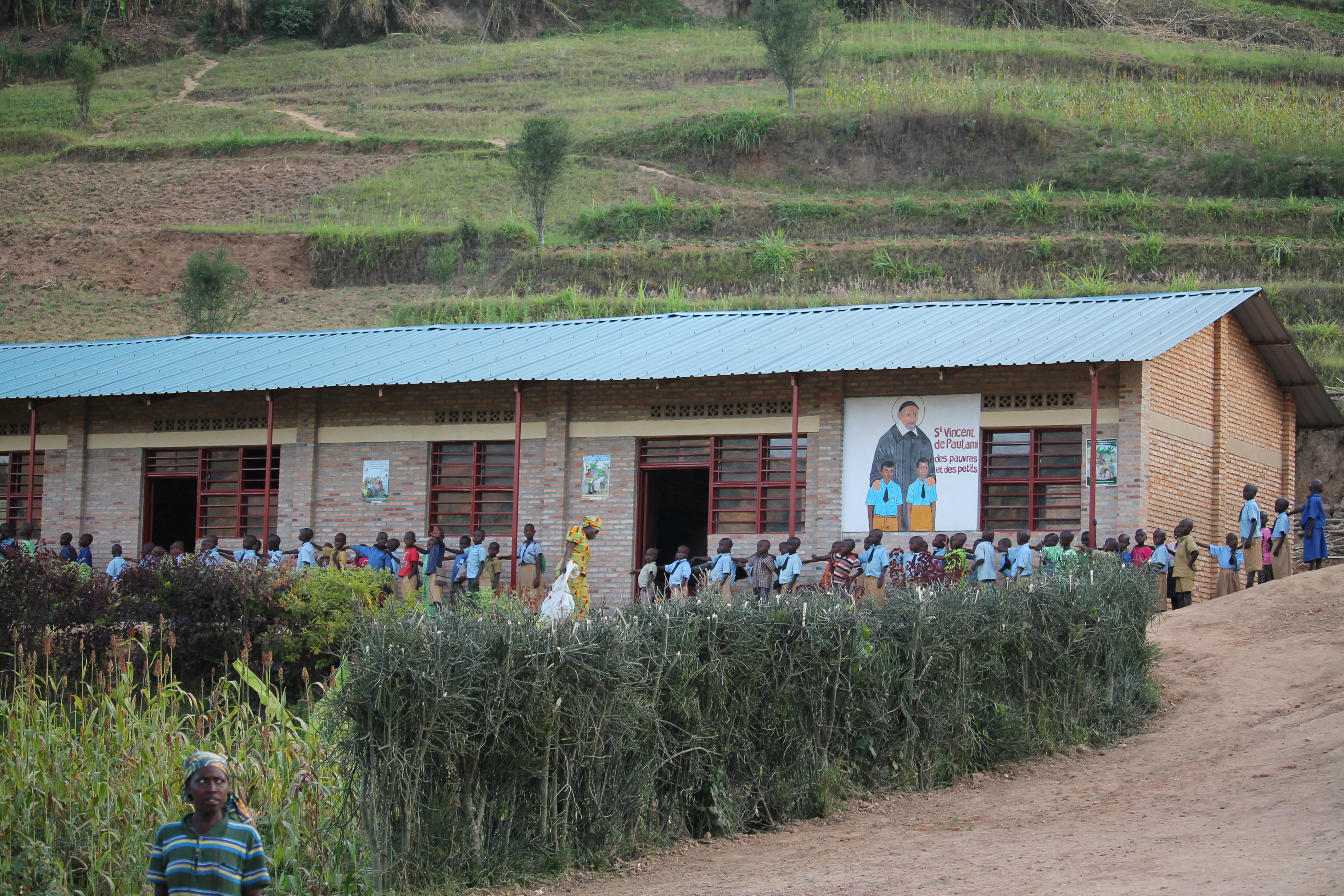 école de Muhihi au Rwanda, entrée en classe des enfants.